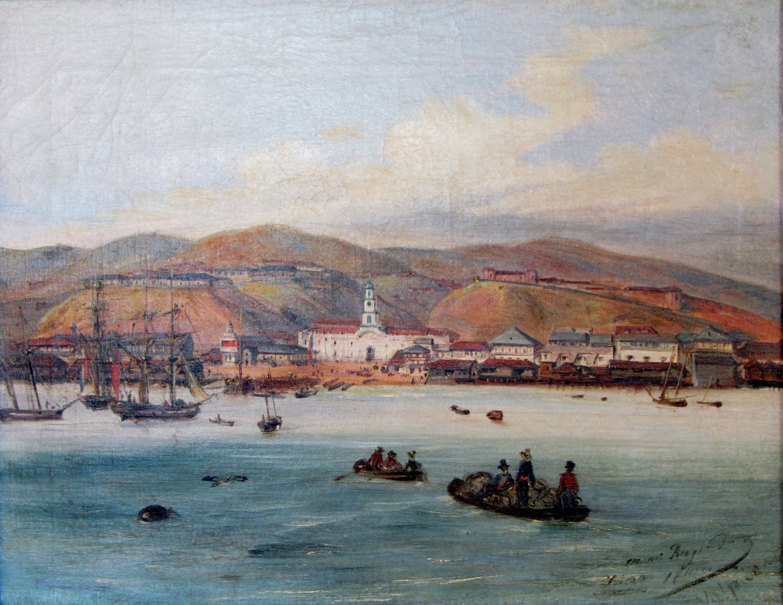 Vista del puerto de Valparaíso desde la bahía. Al centro, en tierra, el edificio la Aduana